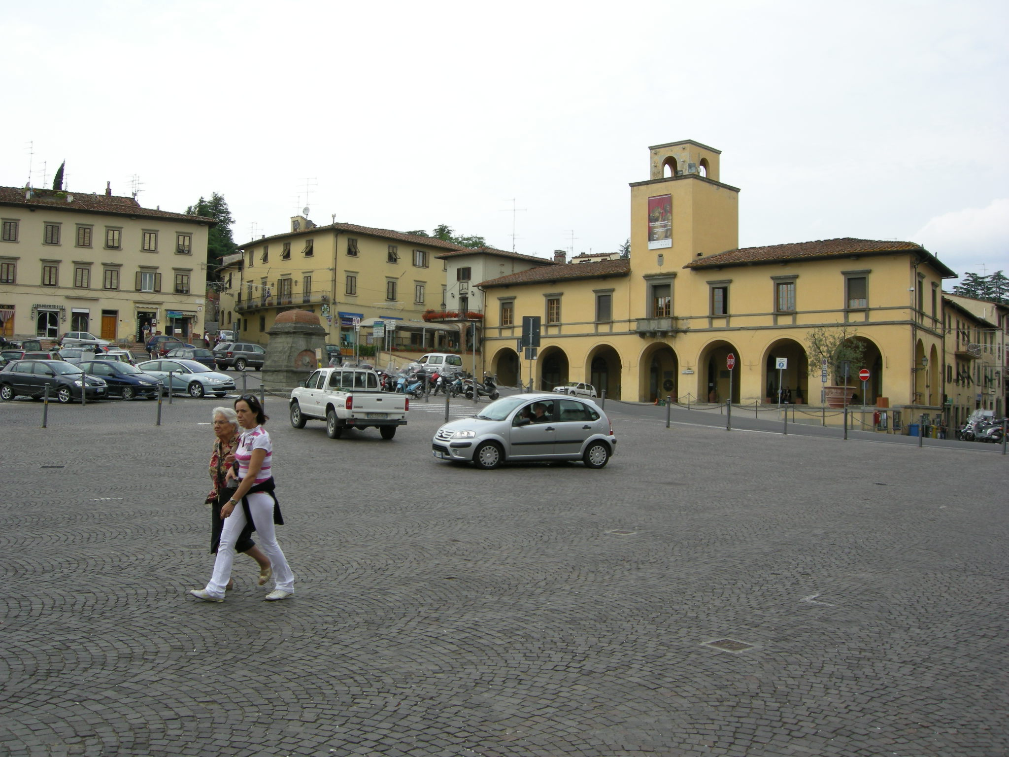 Piazza impruneta